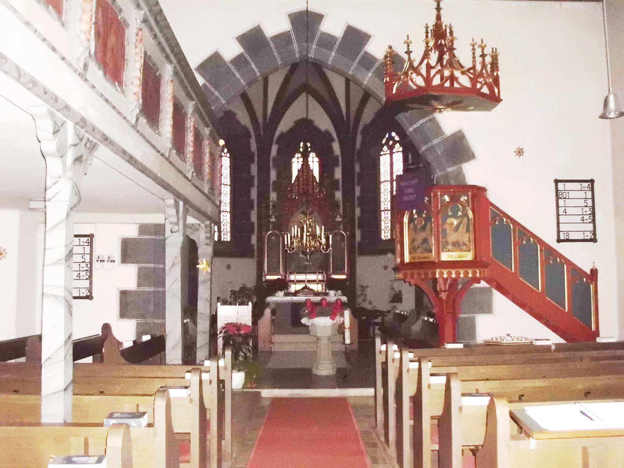 Evang. Kirche St. Jodokus in Gunzenhausen-Unterwurmbach, Landkreis Weißenburg-Gunzenhausen (Bayern), Inneres, Blick nach Osten